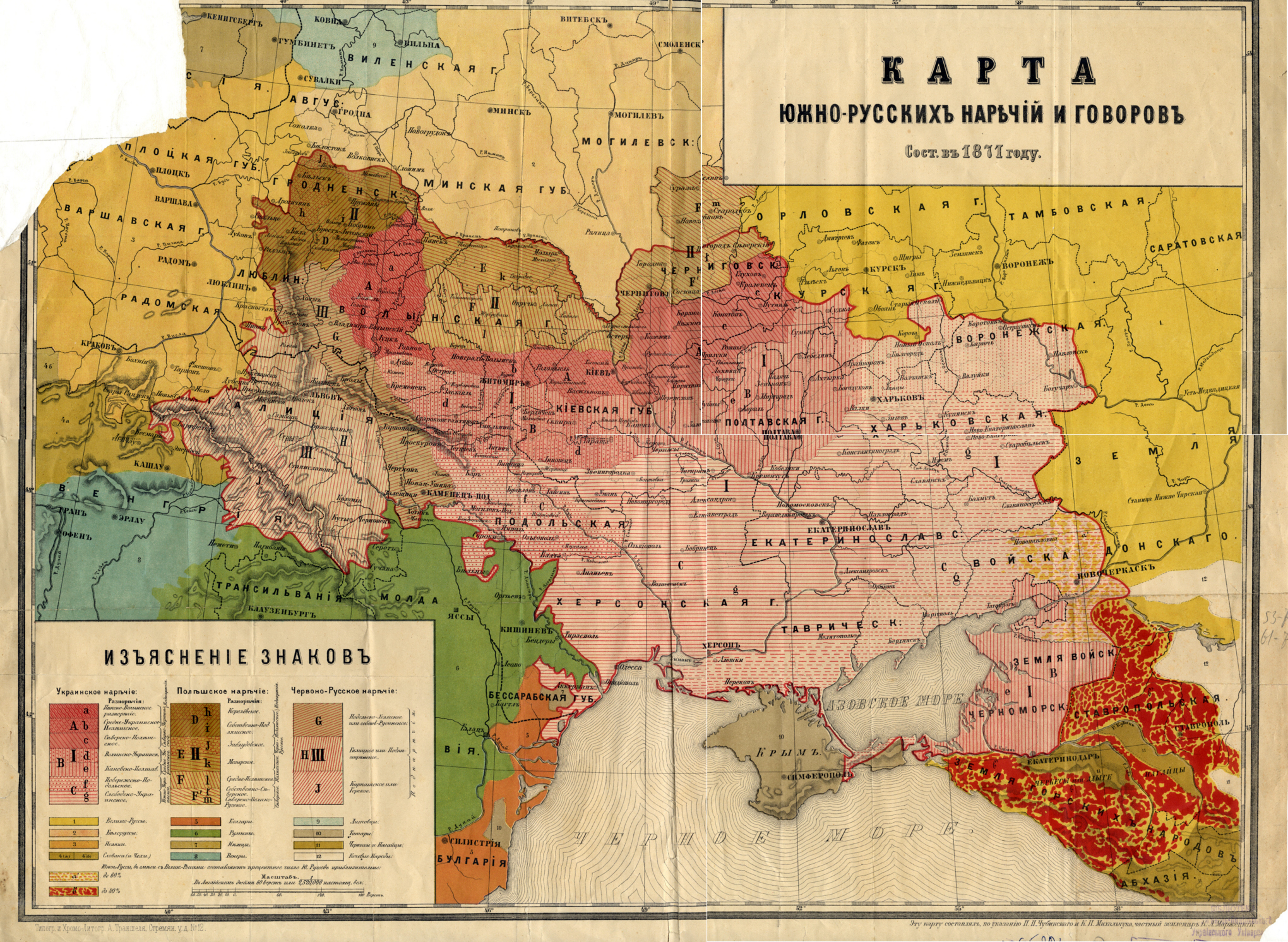 Діалектична мапа української мови станом на 1871 рік